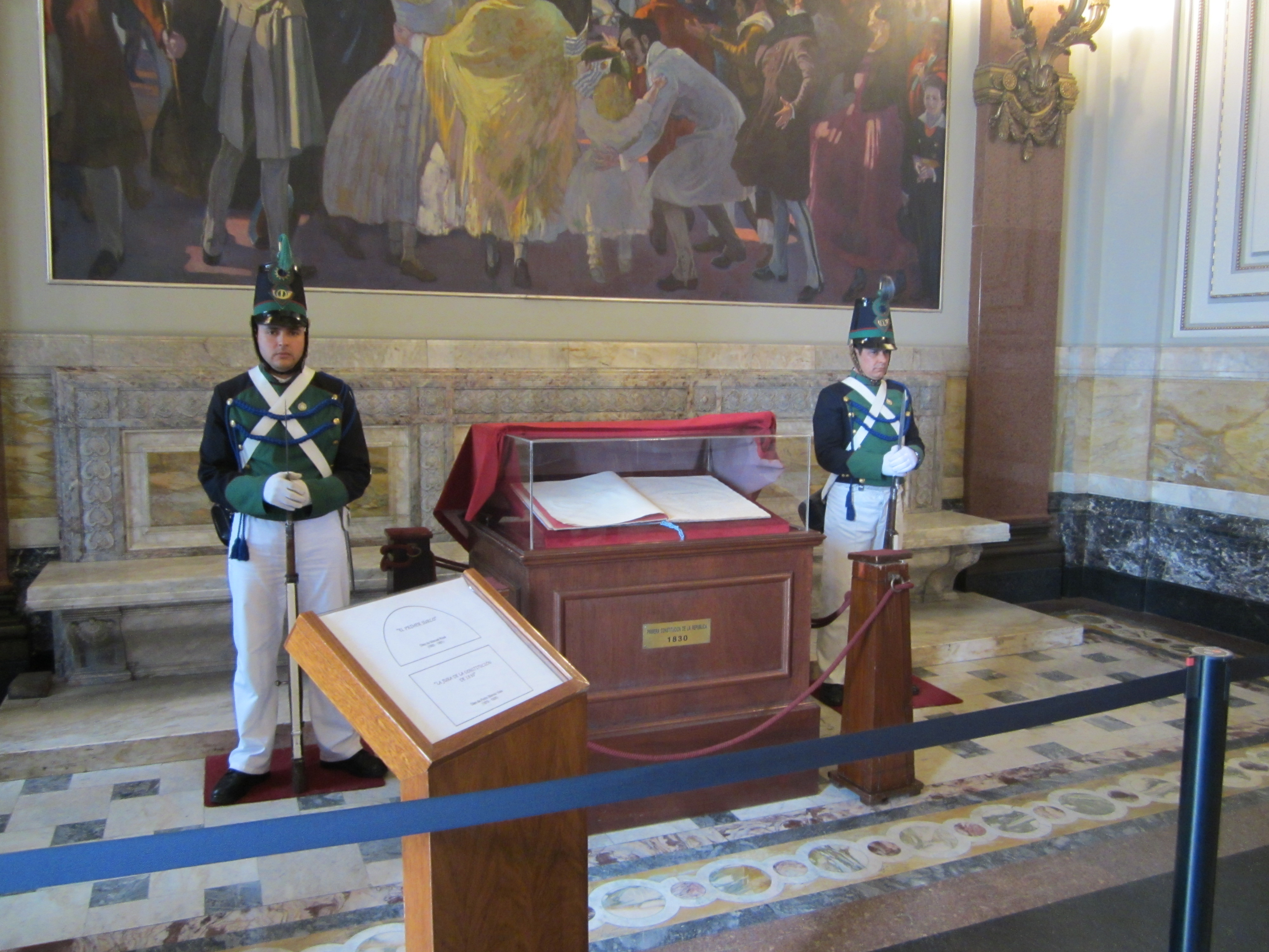 Palacio Legislativo. Ubicada en el departamento de Montevideo